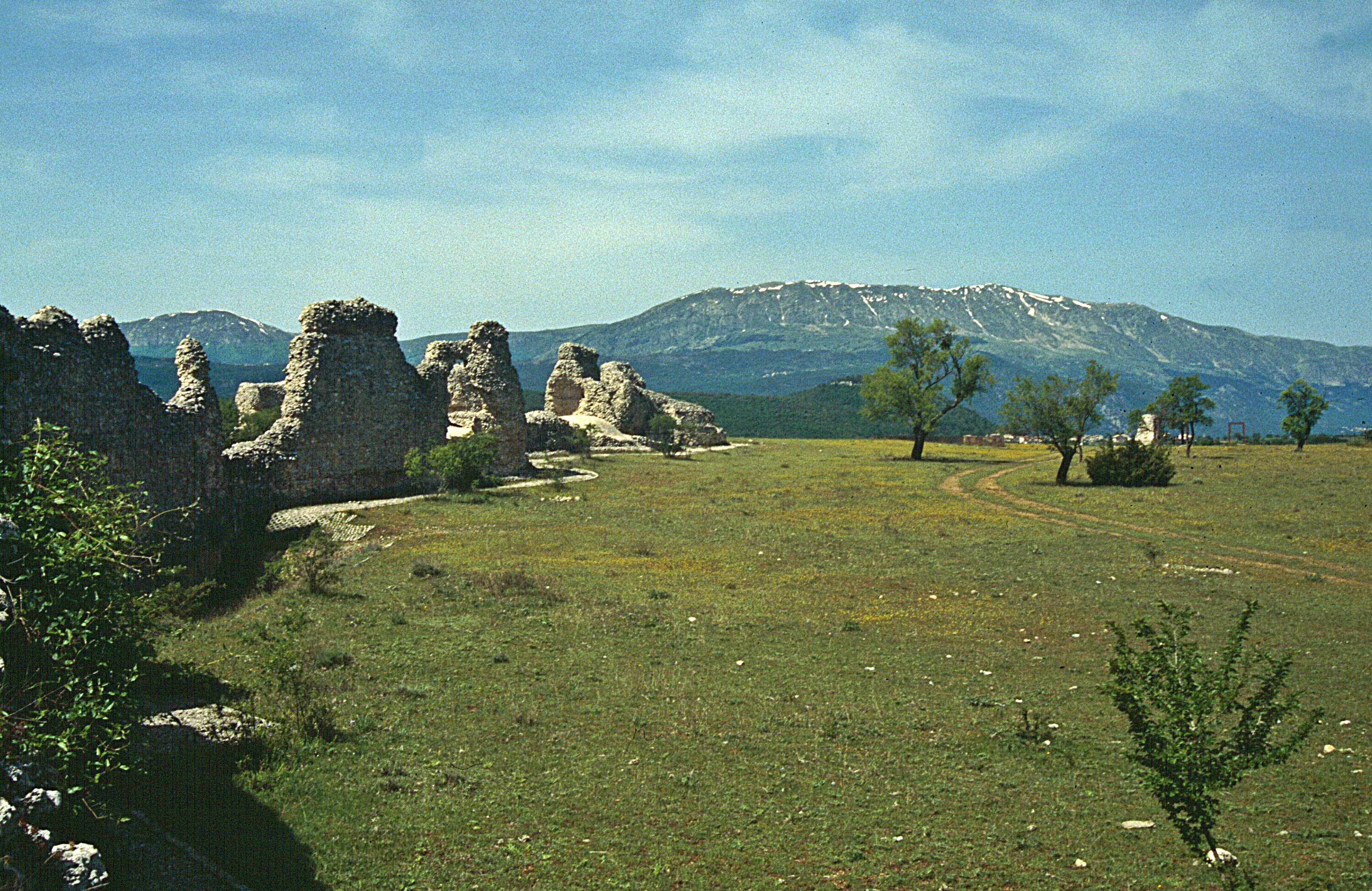 Peltuinum